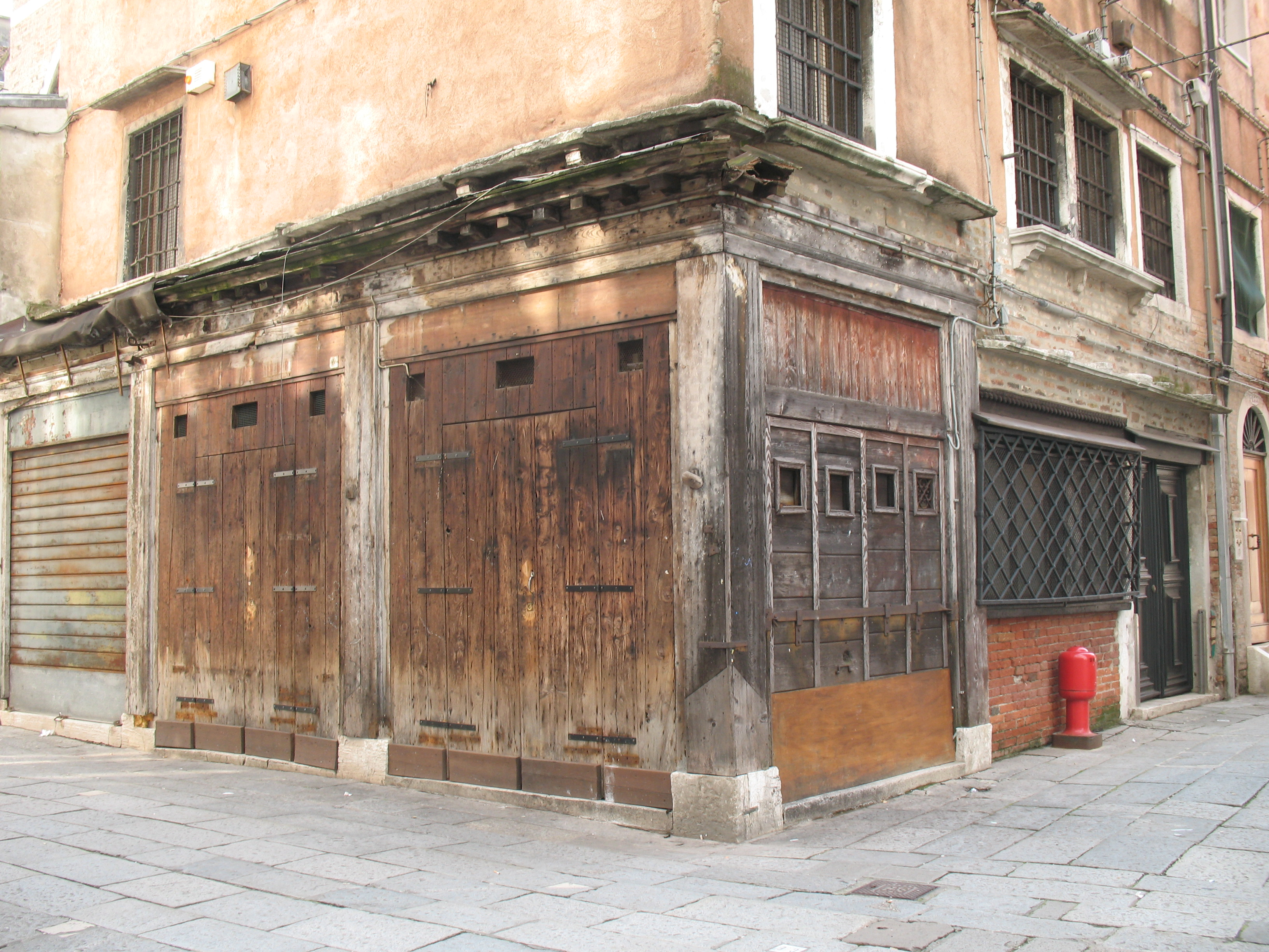 Gebäude mit hölzernen Türen und Klappläden auf der venezianischen Piazza di Rialto, Richtung Canal Grande